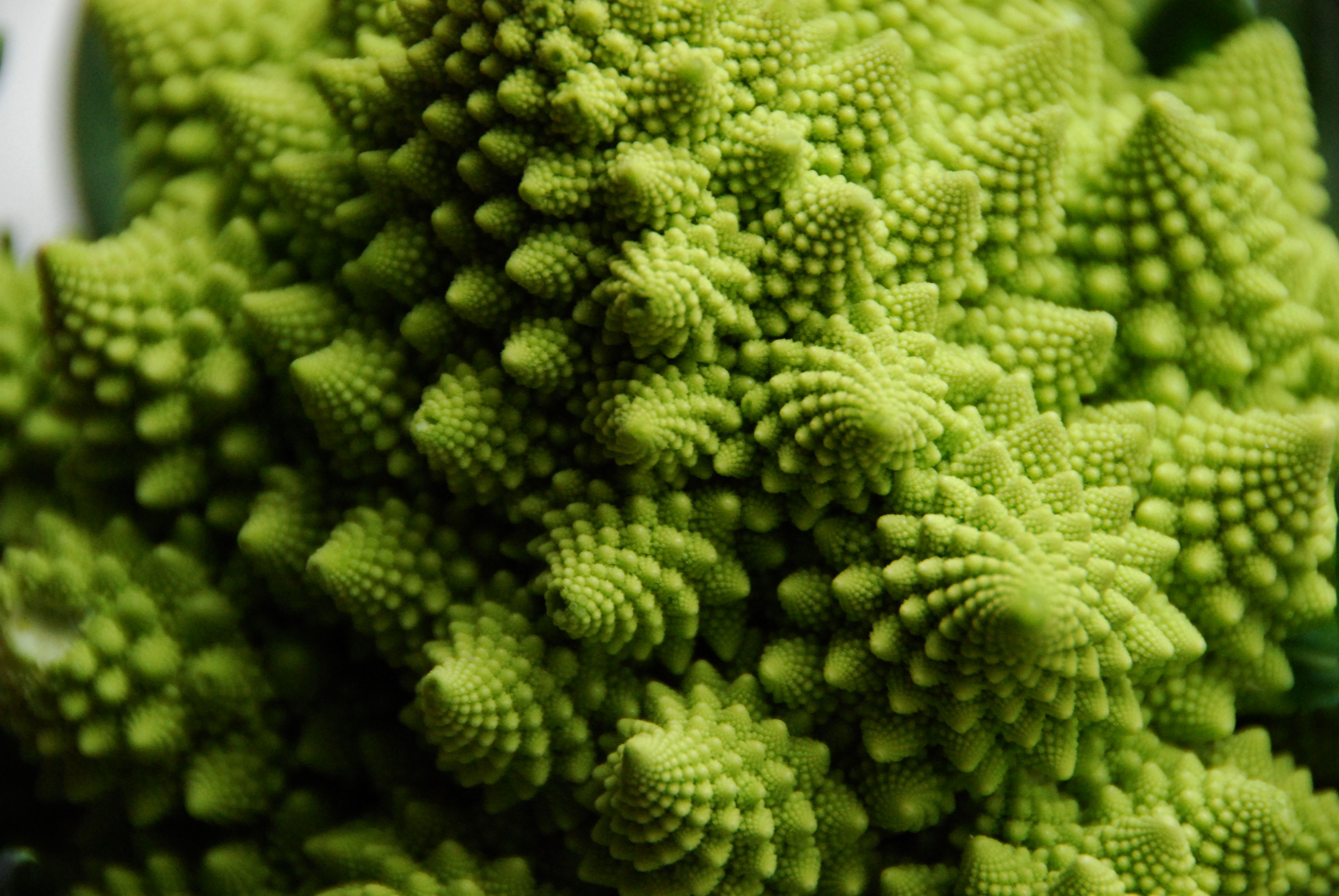 Romanesco